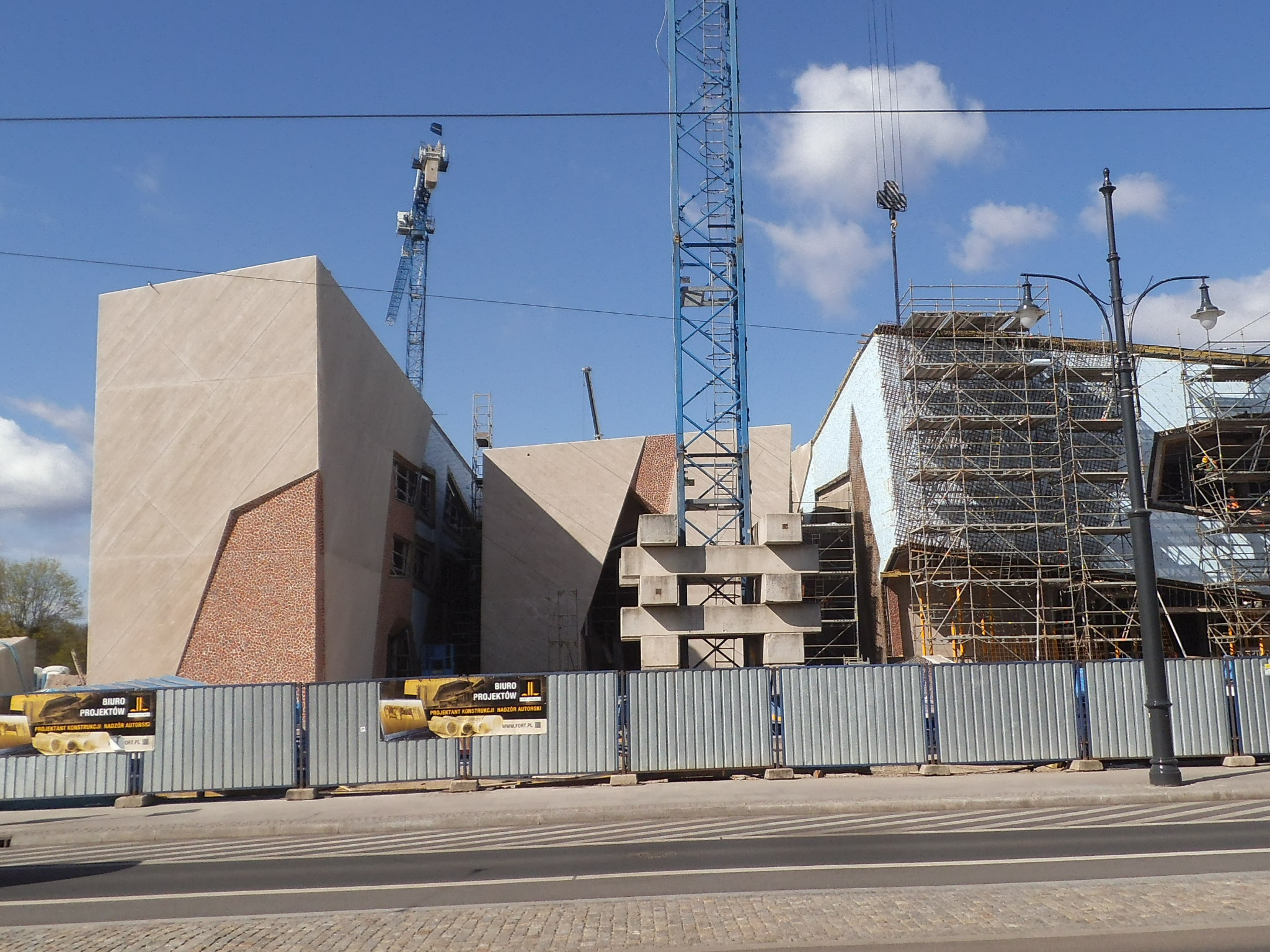 Centrum Kulturalno-Kongresowego „Jordanki” (w budowie)